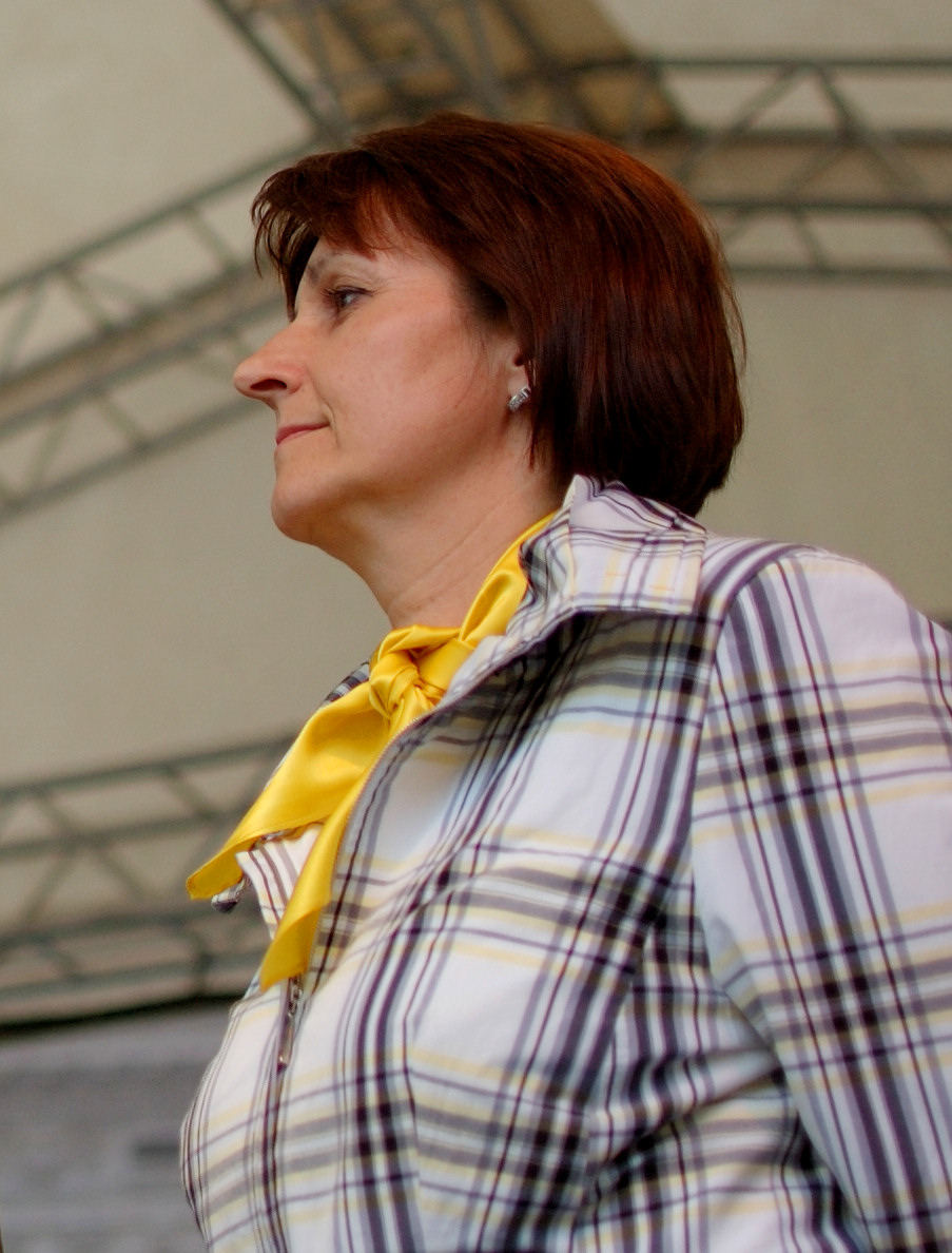 První místopředsedkyně KDU-ČSL Michaela Šojdrová v období při volbách do Poslanecké sněmovny Parlamentu ČR 2010.